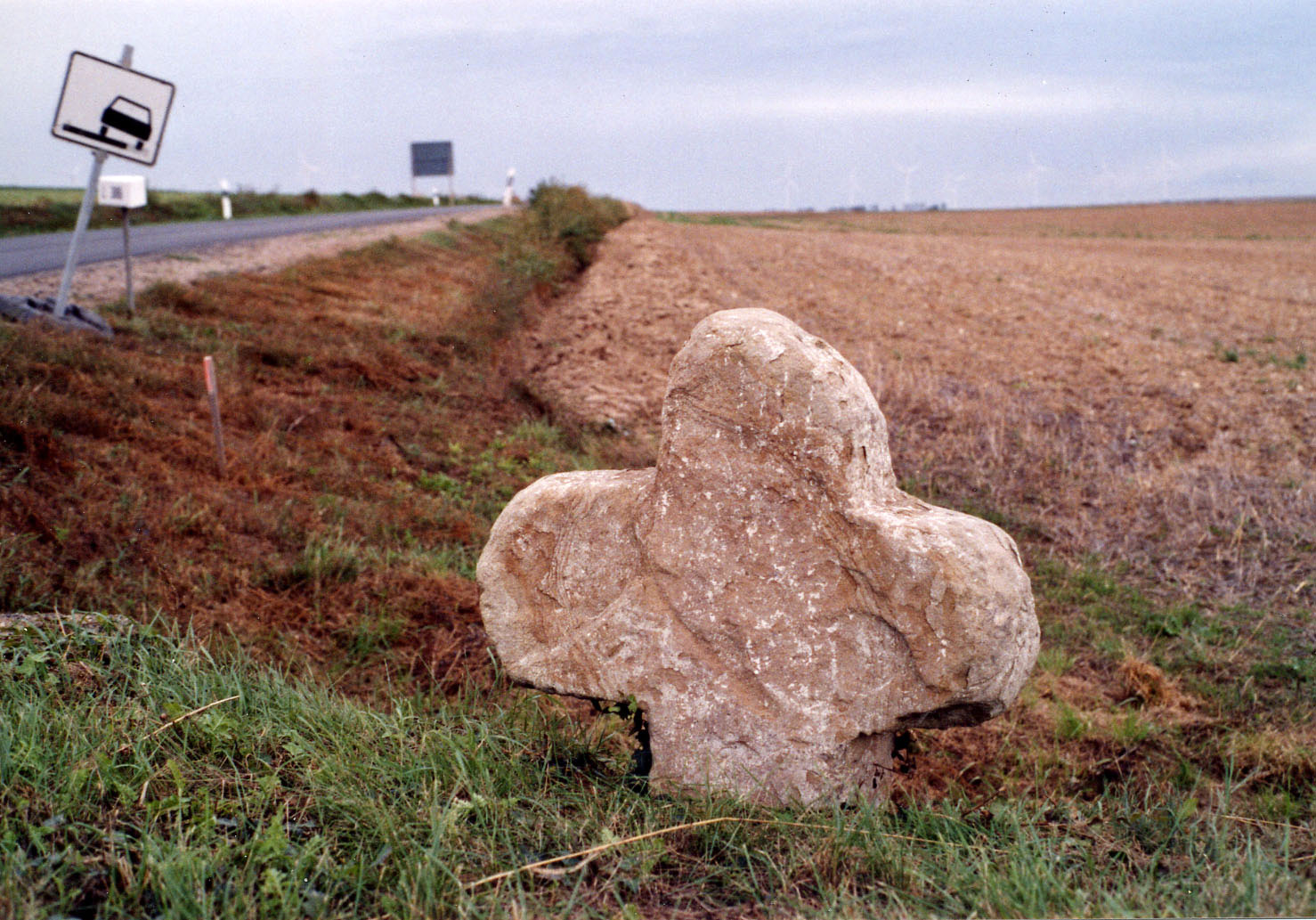 Sühnekreuz nördlich von Gauersheim am Straßenrand bei der Einmündung des Gauersheimer Weges in die Straße Flomborn-Kirchheimbolanden, an K 61/L 445 bzw. L 386